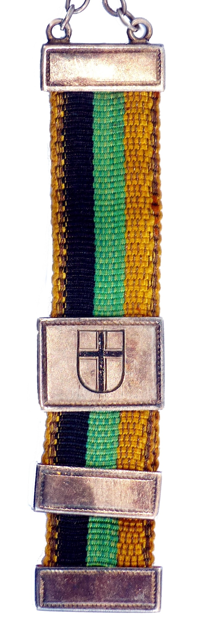 Weinzipfel des Corps Agronomia Königsberg im Rudolstädter Senioren-Convent.